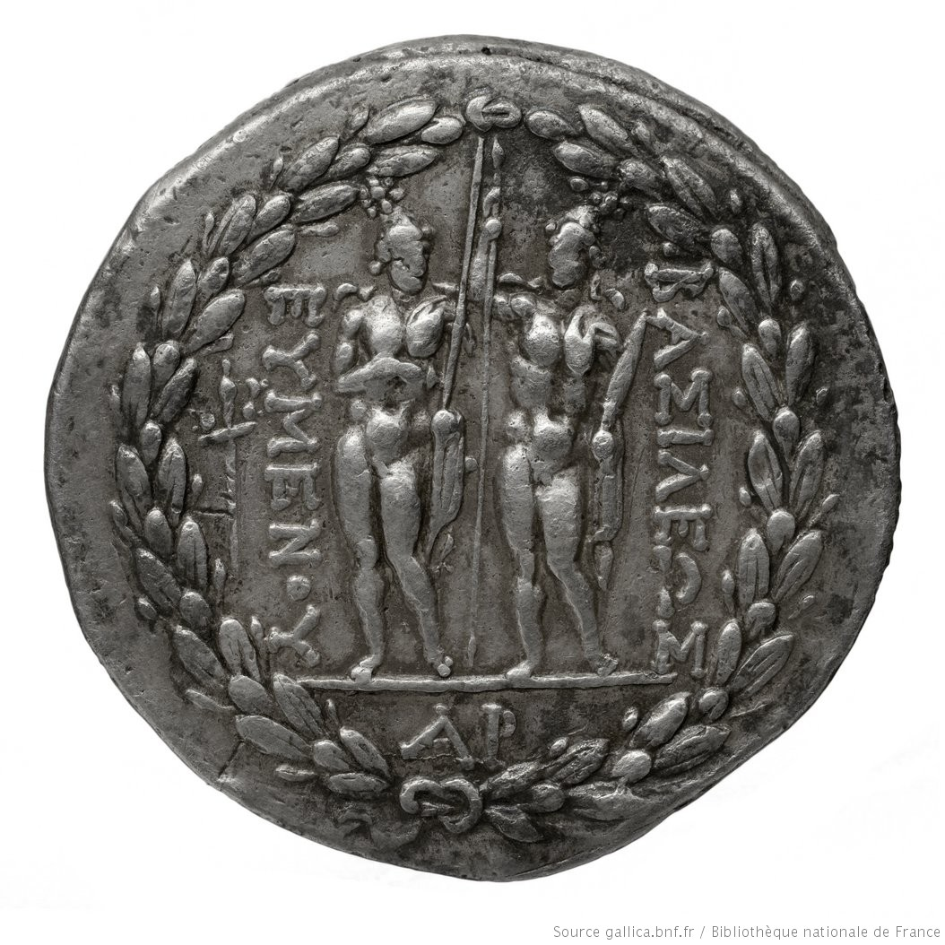 Description matérielle : 1 monnaie ; 16,62 g ; flan circulaire Matière et technique de production : Argent, frappe